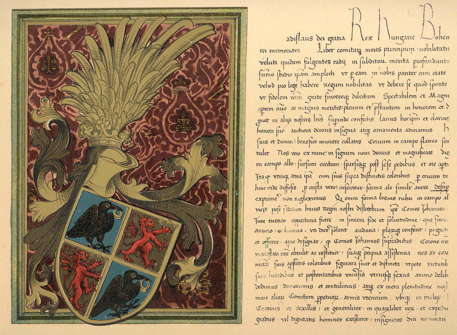 RÉSZLET HUNYADI JÁNOS CZÍMERLEVELÉBŐL. Kelt Pozsonyban, 1453. február 1-én. – Eredetije az országos levéltárban.